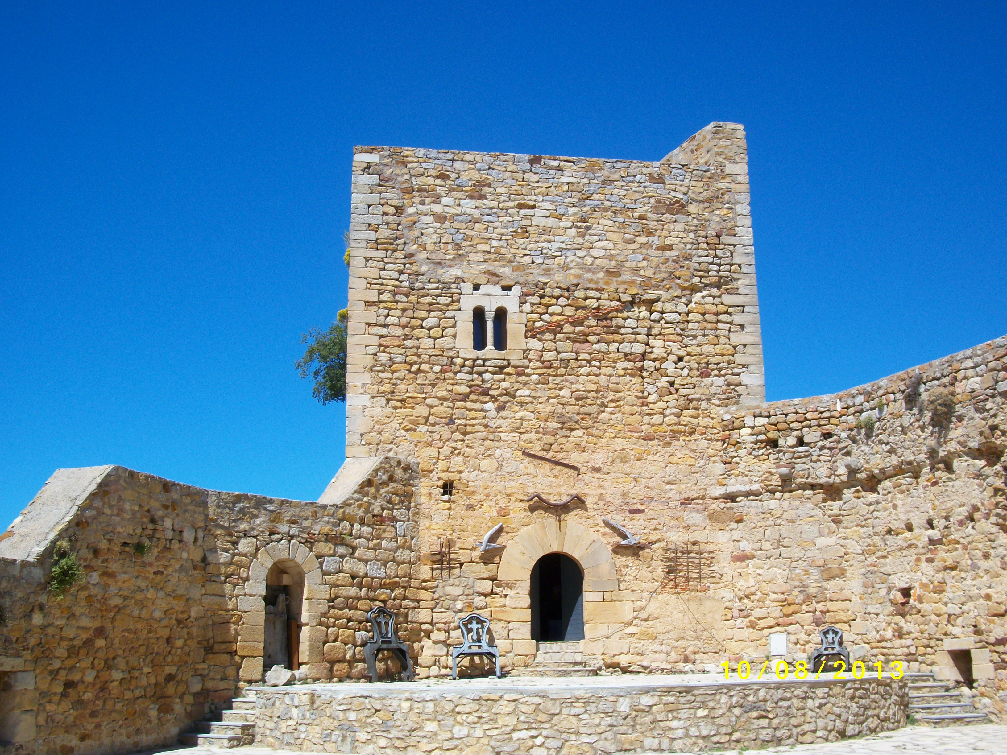 Castillo de Puertomingalvo donde en el interior se encuentra un museo histórico